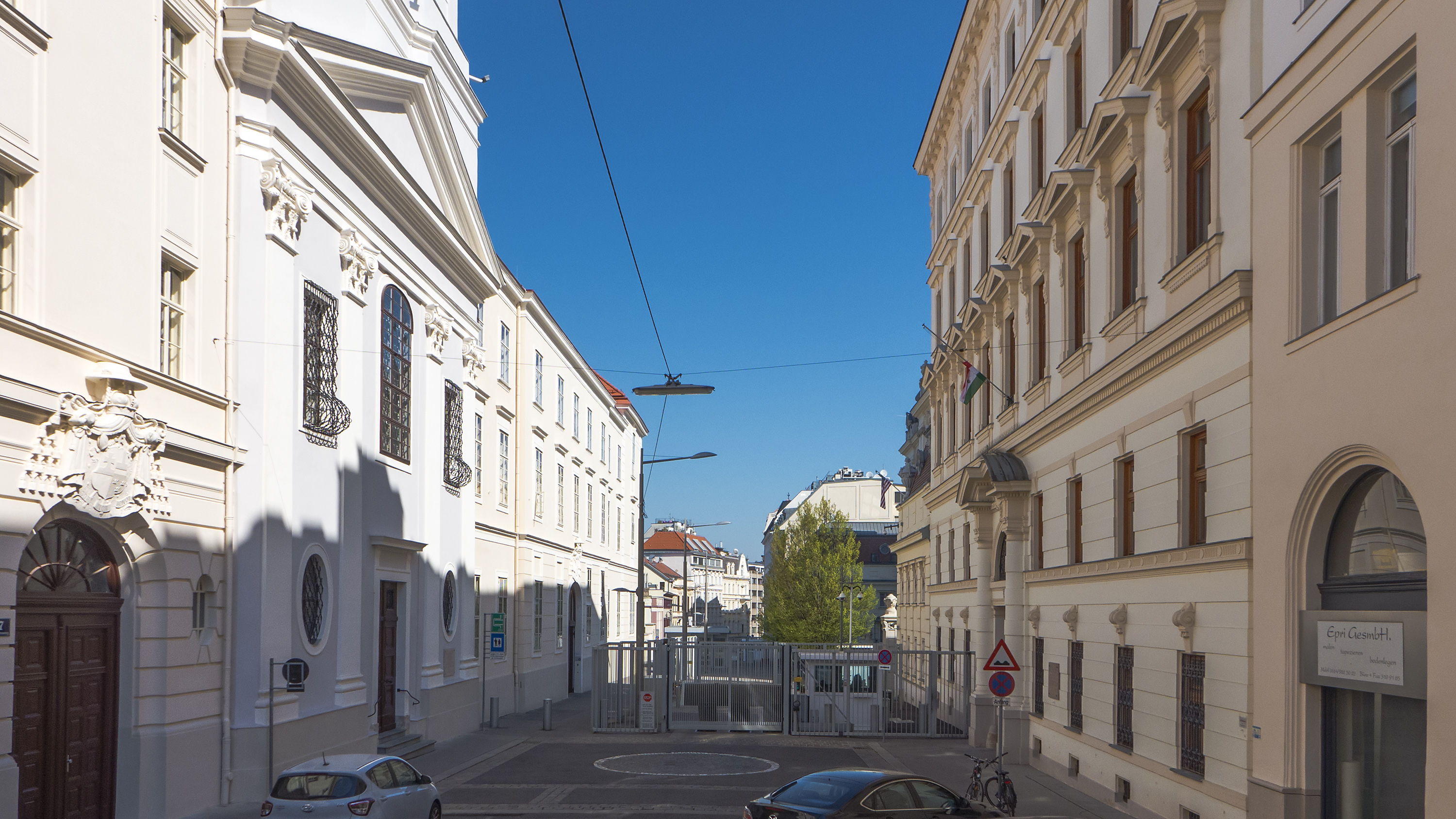 Boltzmanngasse in Wien 9 bei Nr. 7 Richtung Norden